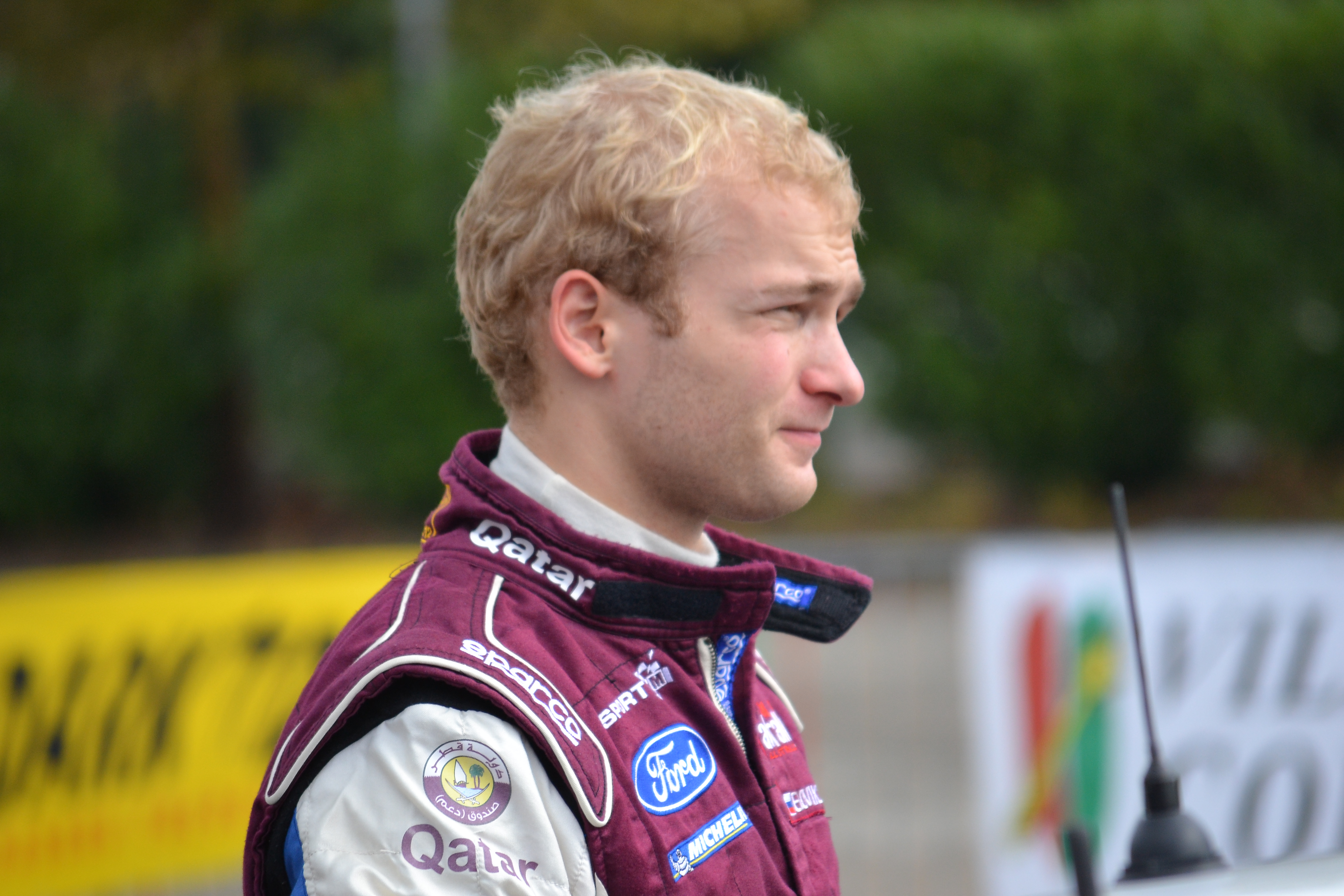 Evgeny Novikov au parc d'assistance de Colmar durant le Rallye de France-Alsace 2013.